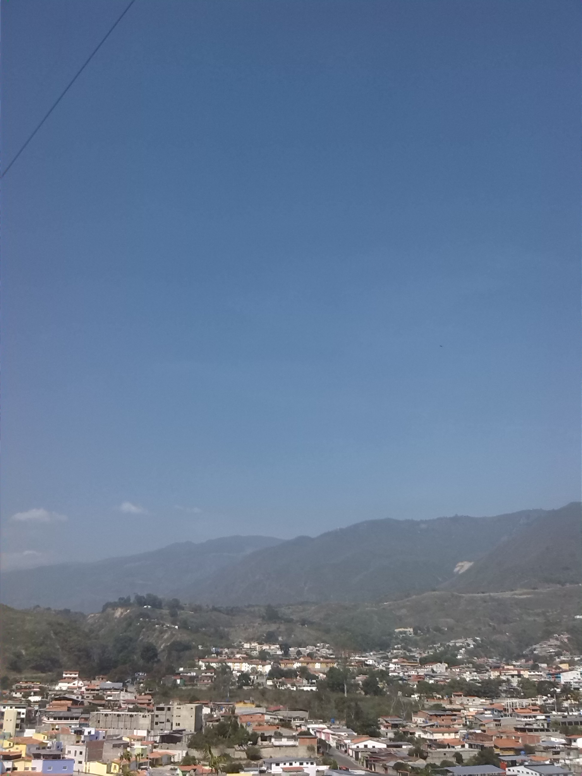 paisaje